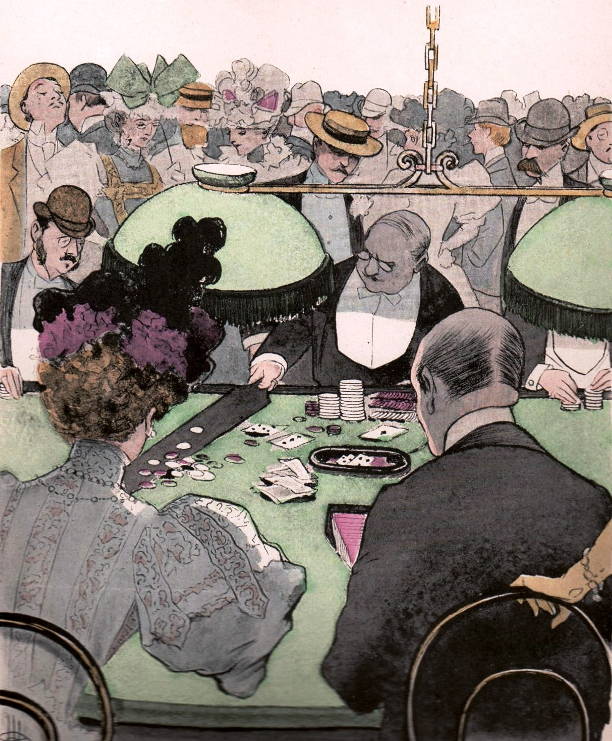 Catalan: Una partida de bacarà.